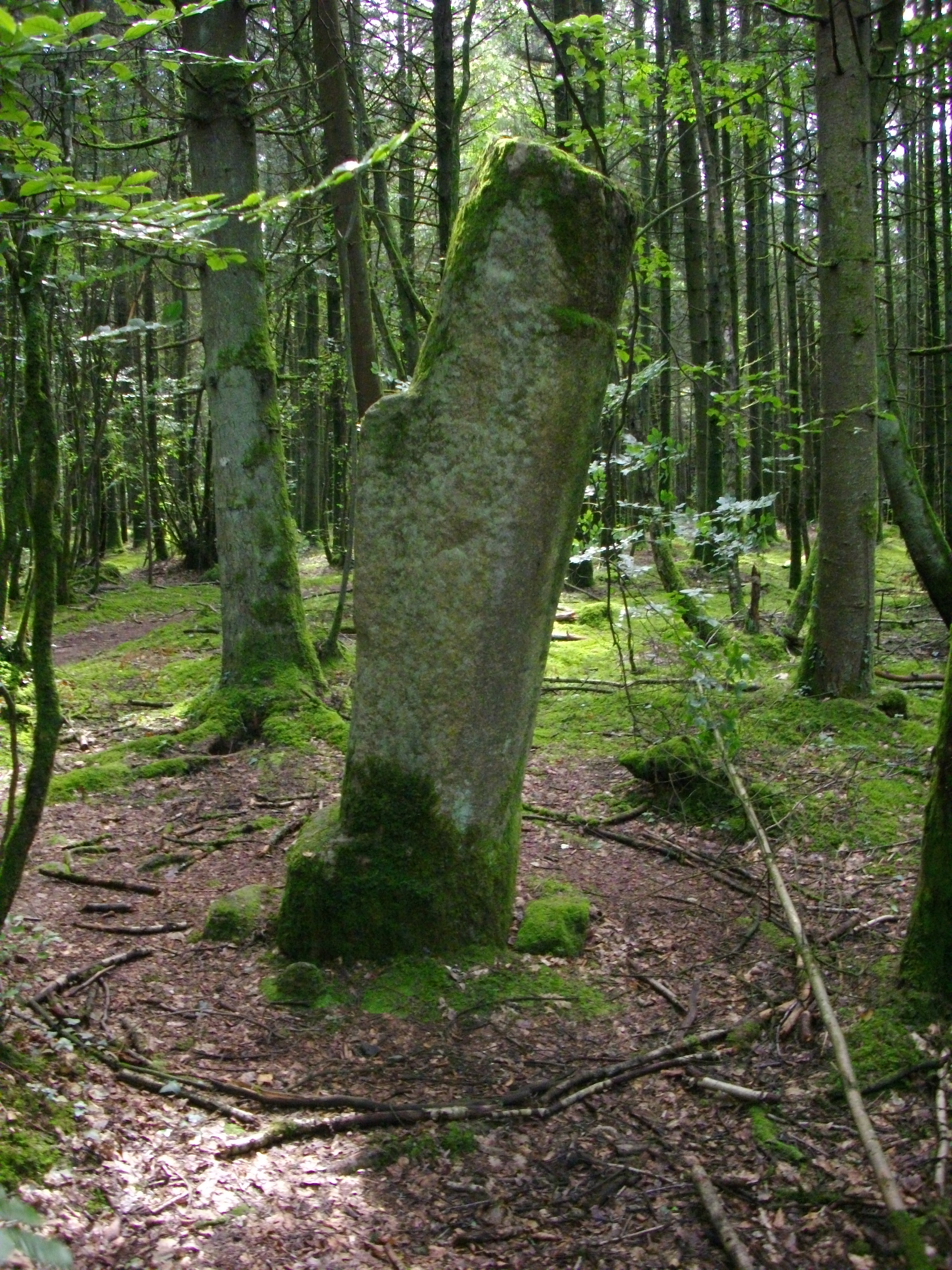 Menhir dit Babouine, Trédion (France, Morbihan)